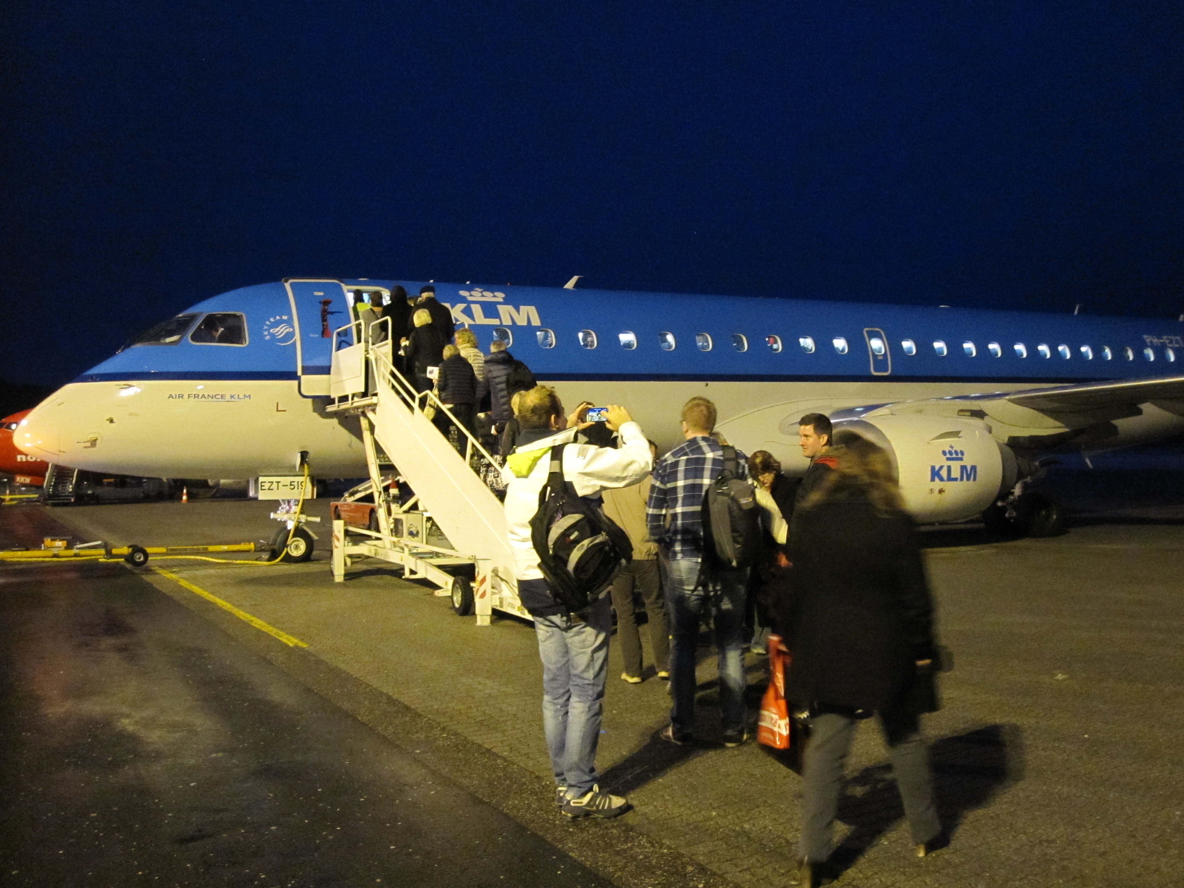 På Kjevik